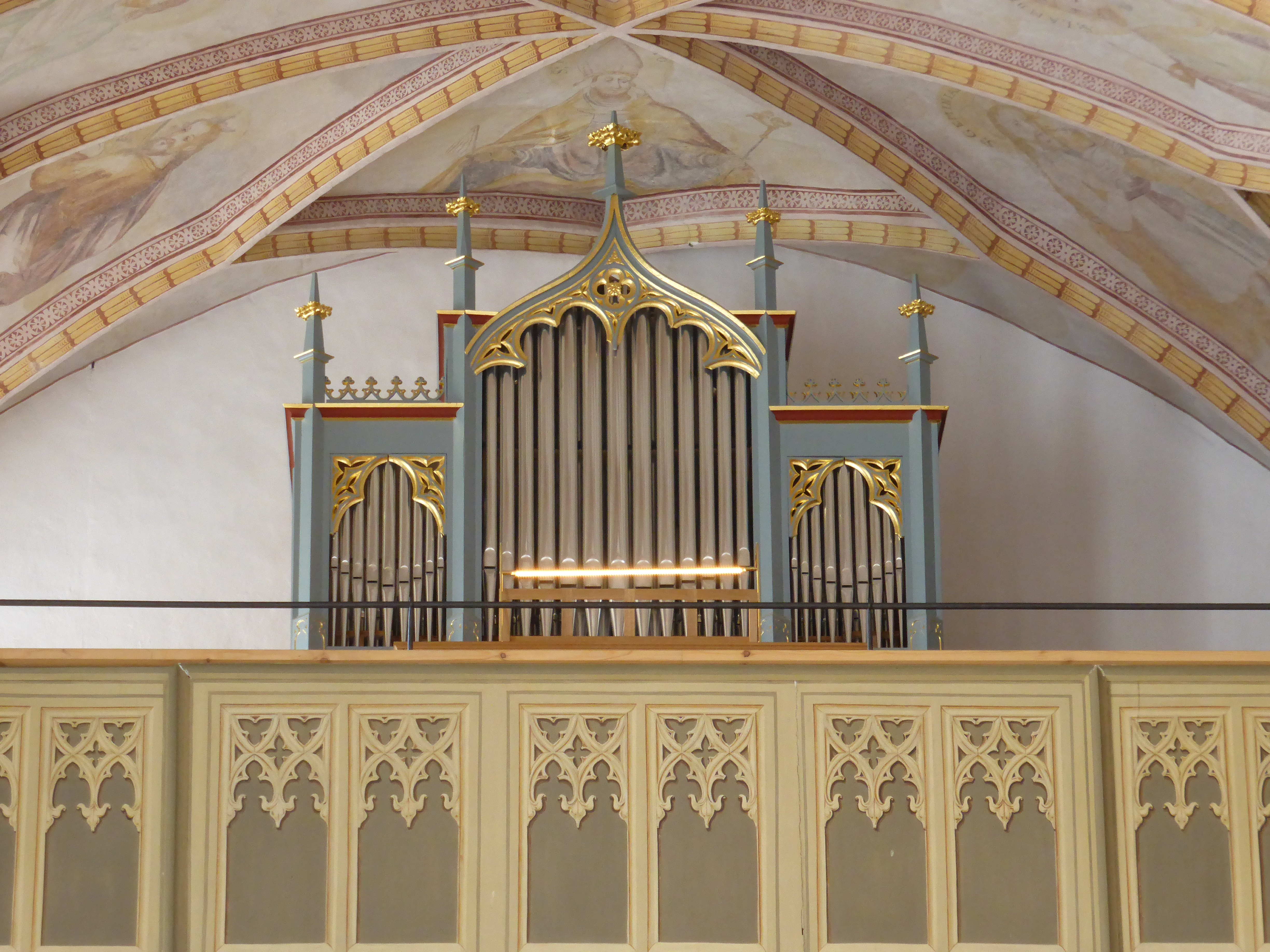 Am 16. Oktober 2016 eingeweihte Linder-Orgel mit 17 Registern